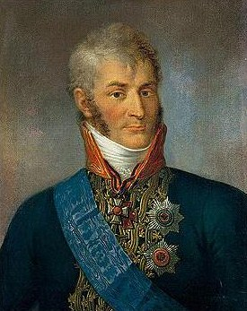 Граф Н. А. Зубов (1763-1805)